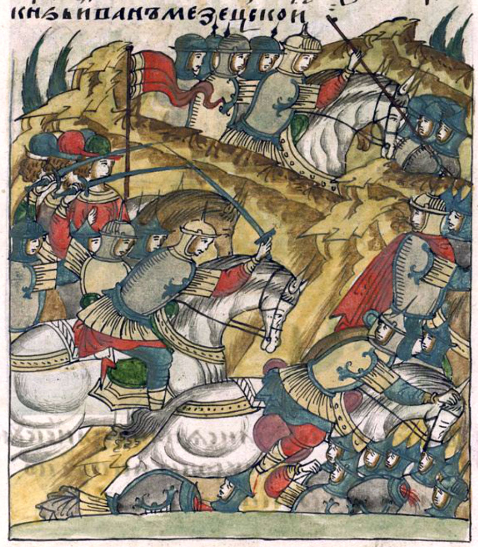 Лицевой летописный свод. Поход на Казань в 1529 (1530).